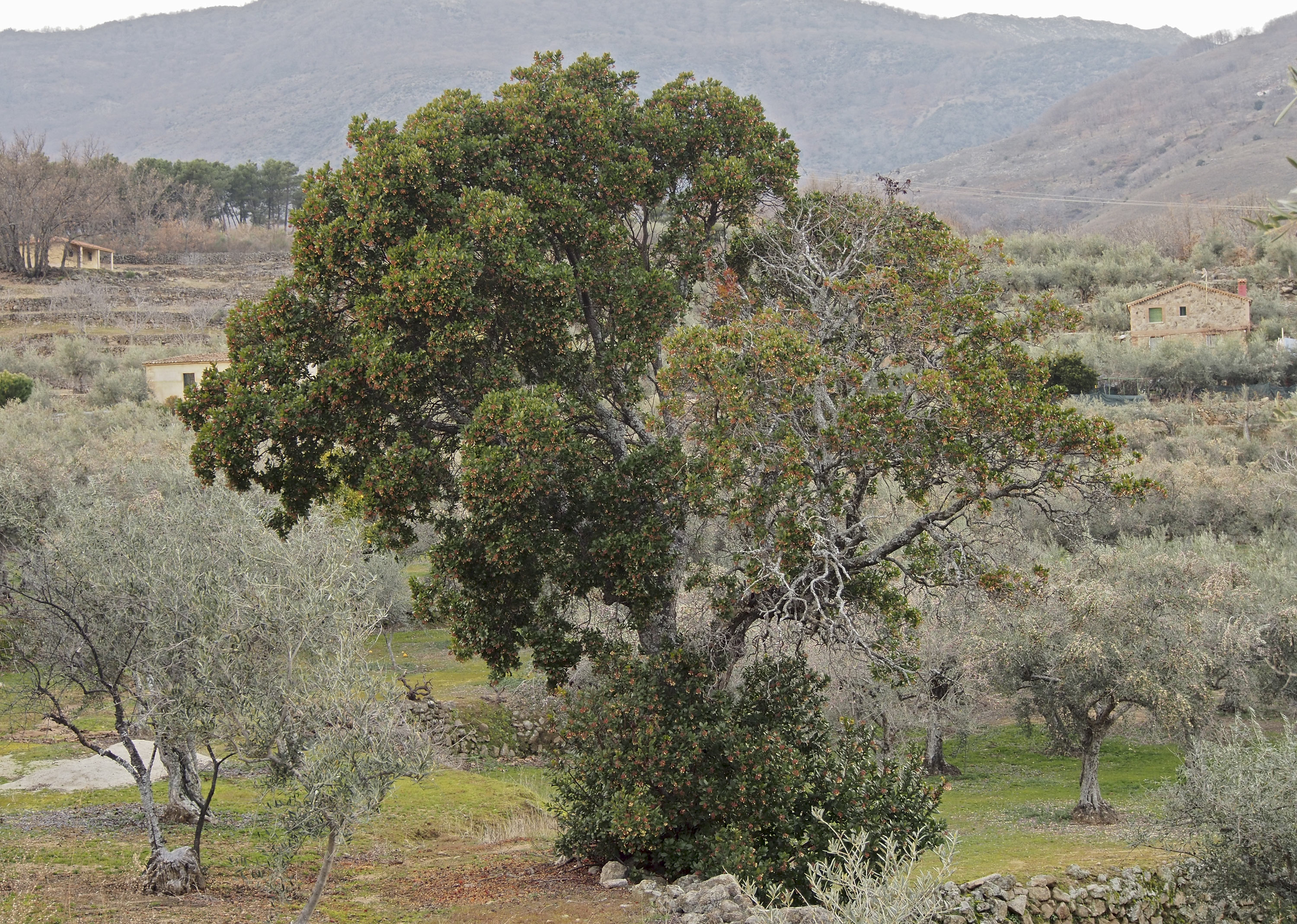 Madroño (Arbutus unedo). Losar de la Vera (Cáceres, España).